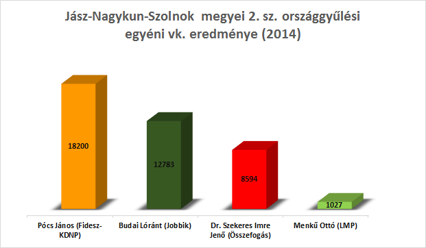 Jász-Nagykun-Szolnok megyei 2. sz. országgyűlési egyéni választókerület választási eredmények (2014)